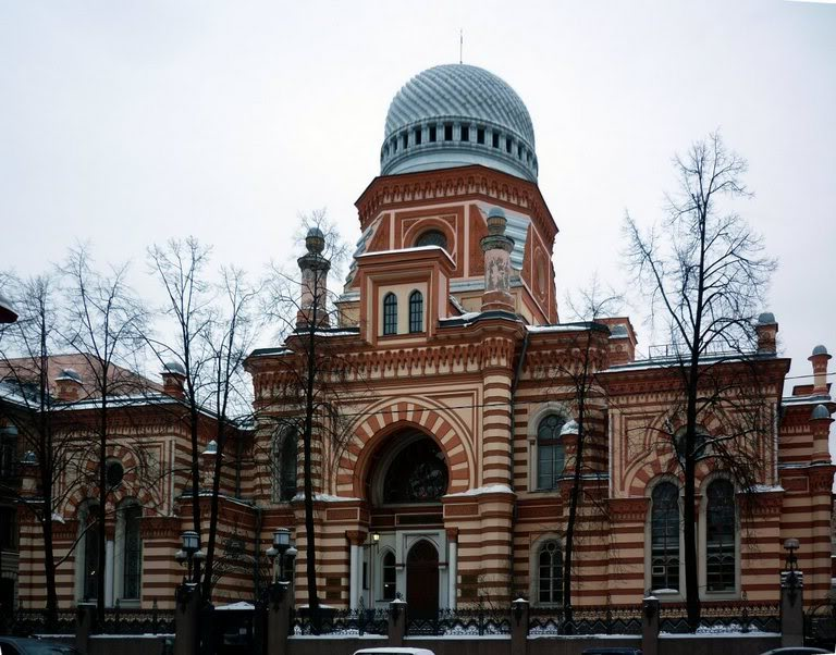 Вид на синагогу